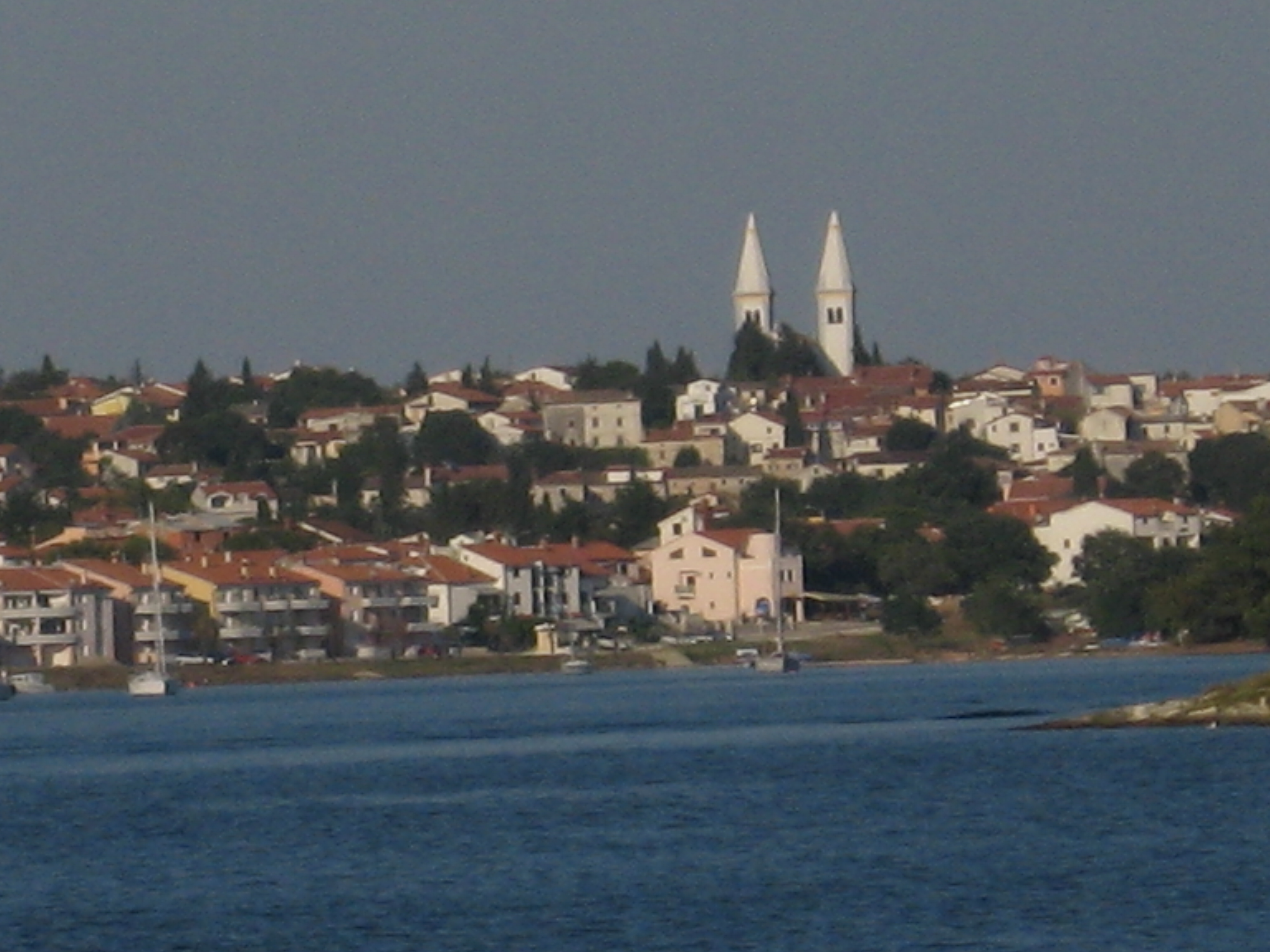 Panorama Medulin